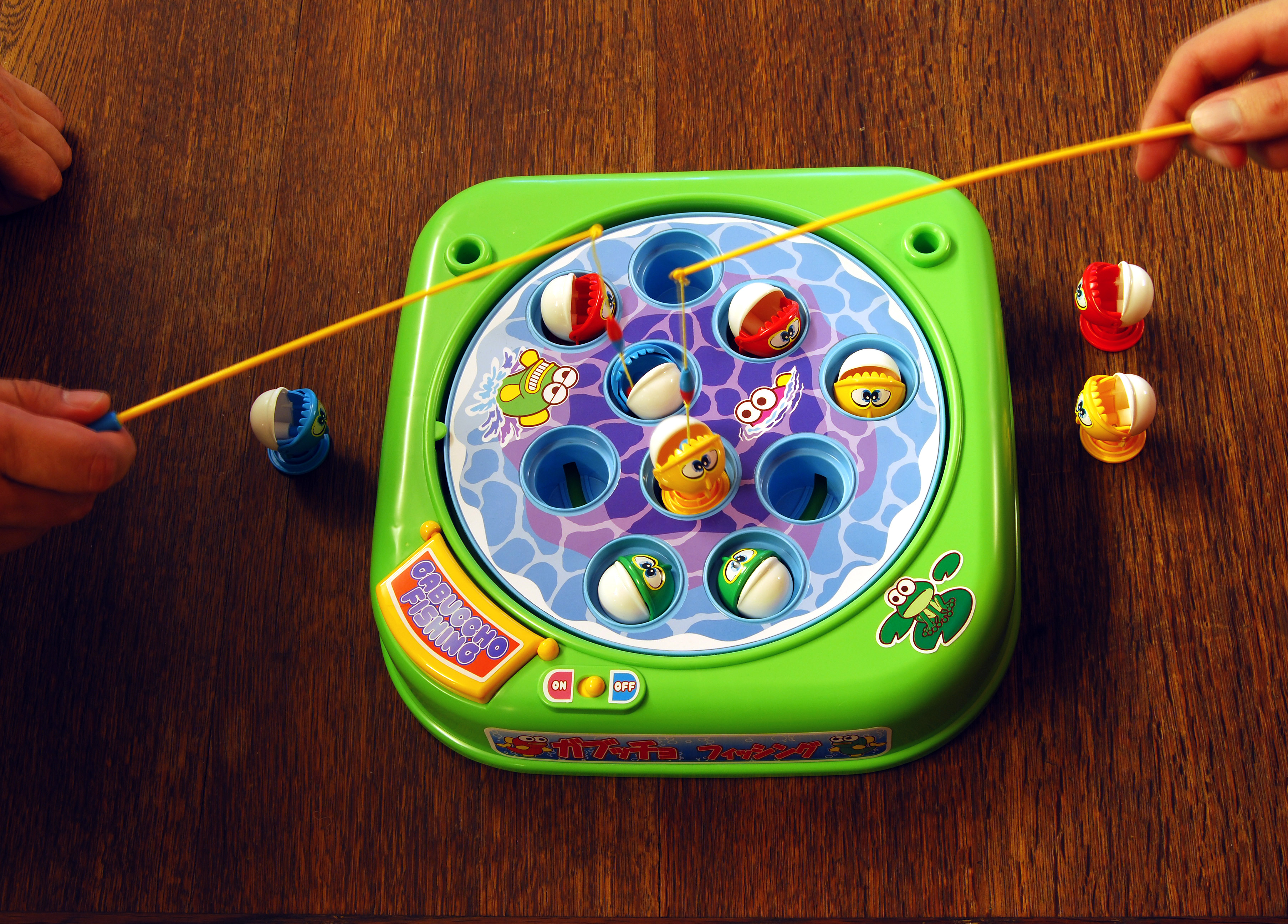 Mechanisches Angelspiel aus Japan (Cambuccho Fishing).